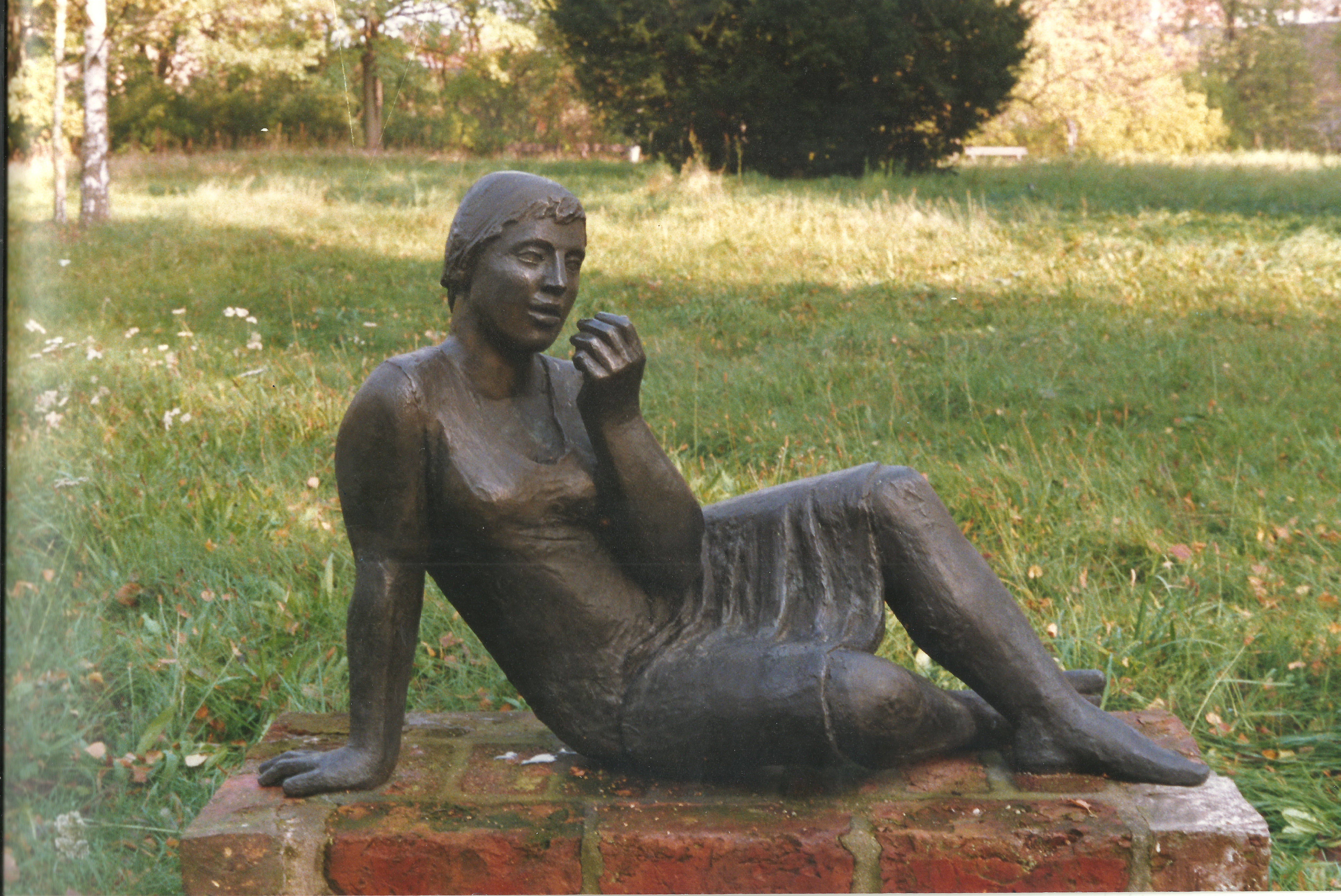 Material: Bronze, 1962, h = 75 cm